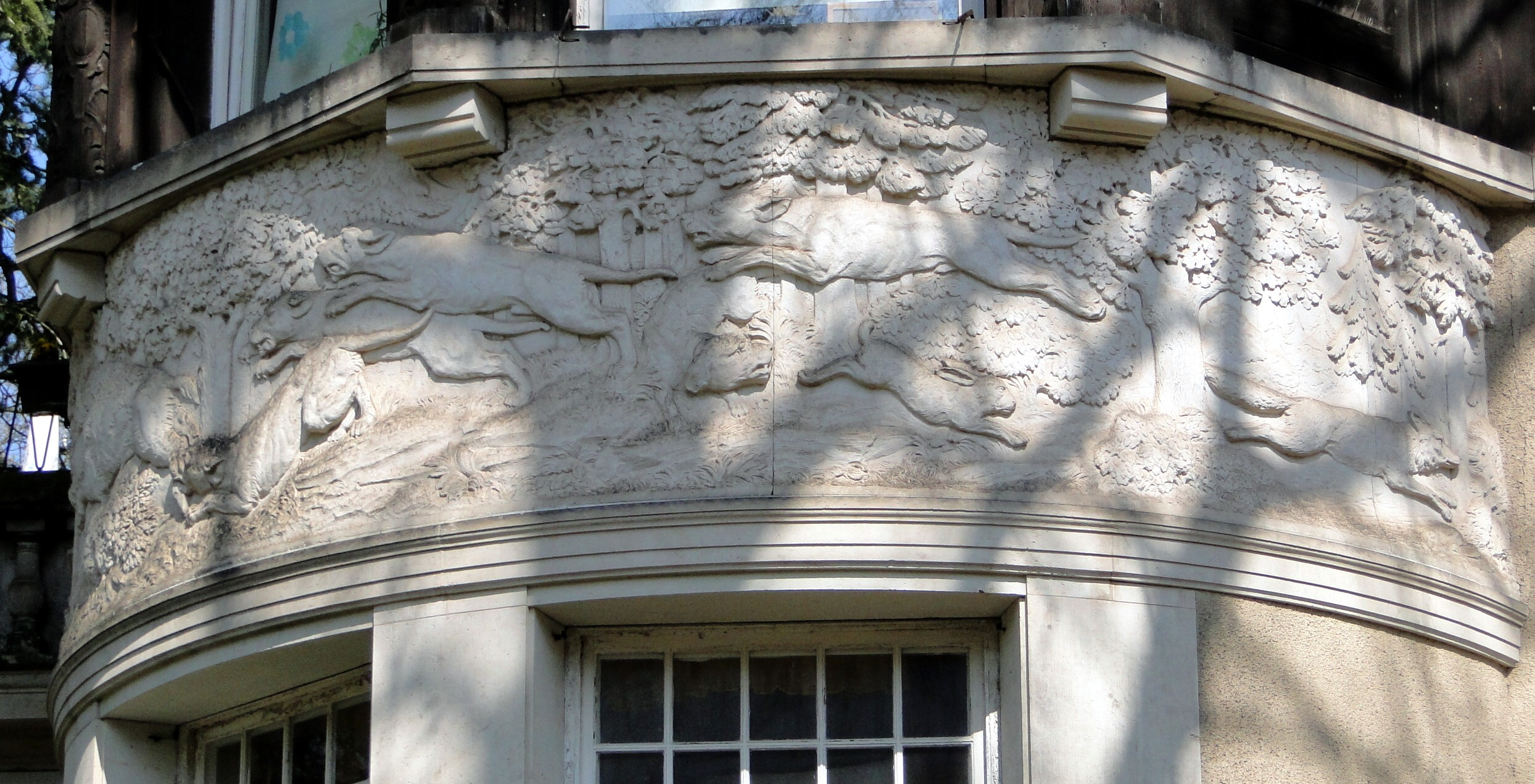 Detail der Villa Zietz auf dem Weißen Hirsch in Dresden